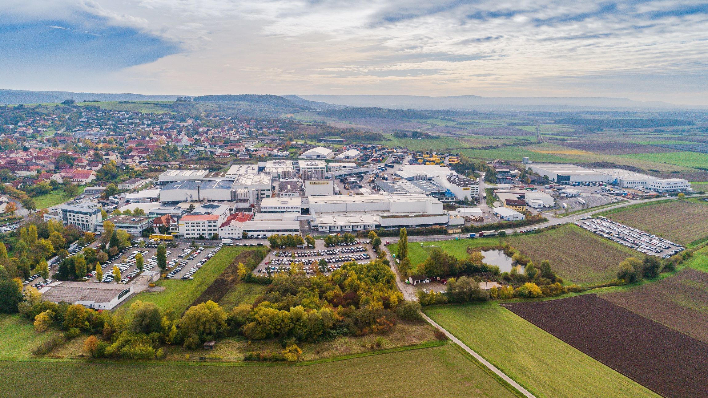 Luftbild vom Hauptsitz FRÄNKISCHE in Königsberg